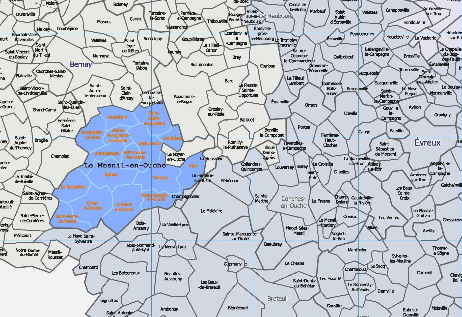 Nouvelle commune du Mesnil-en-Ouche.